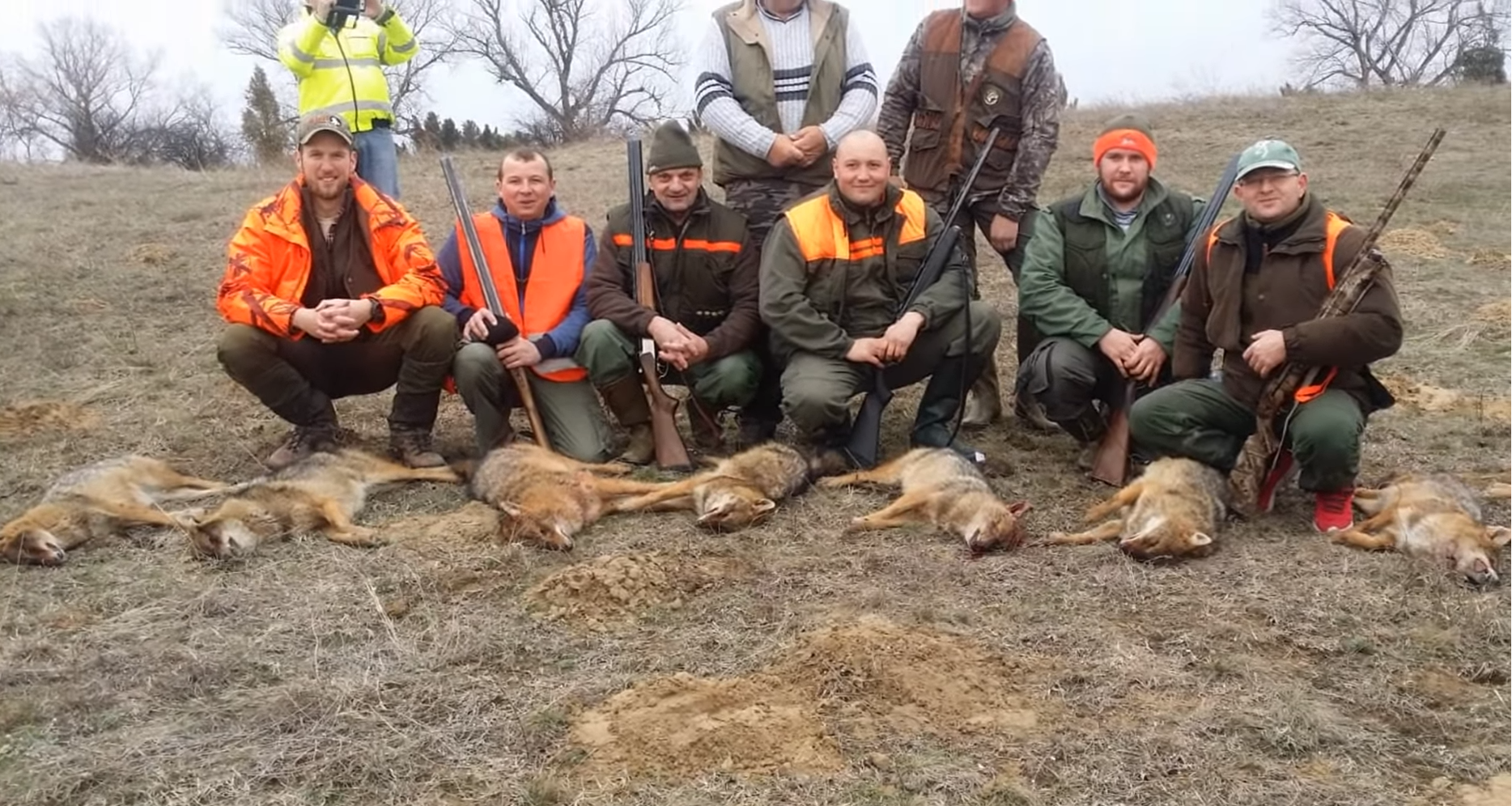 Februar mesec pogonskih lovova na predatore. Ove nedelje smo gostovali u lovištu "Mramorak", mladi ljudi sa odličnom vizijom i još boljom organizacijom. Svaka čast domaćinima na odličnom druženju i još boljem lovu. Do sledećeg viđenja!